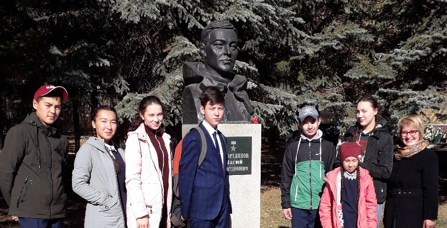 У бюста Герою Советского Союза Шаги Ямалетдинова. Белорецк.